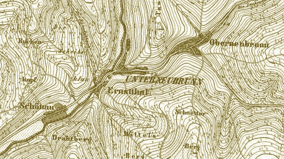 Auszug der Urmesstischblätter zu Schleusingen.